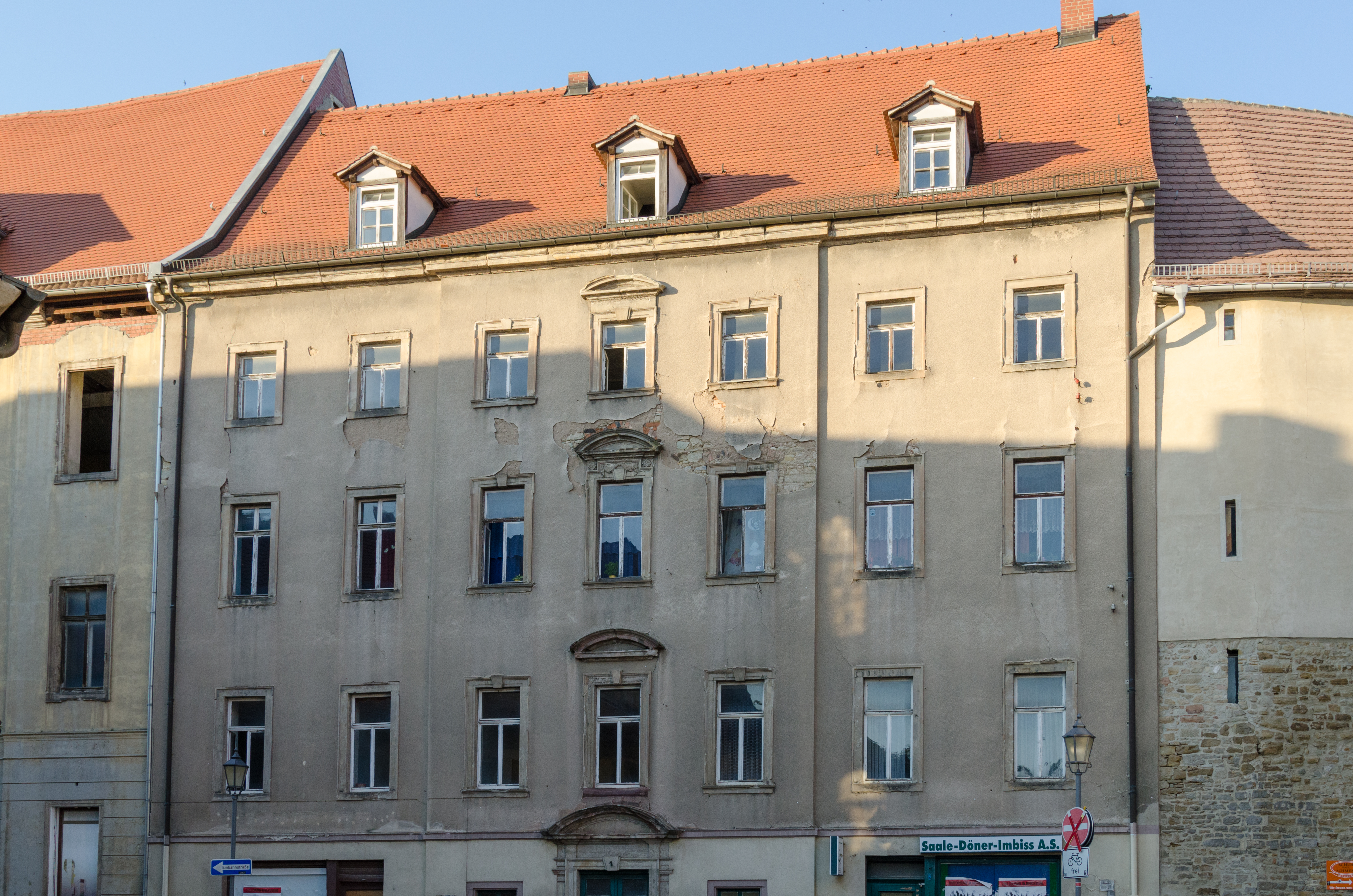 Merseburg, Domstraße 1